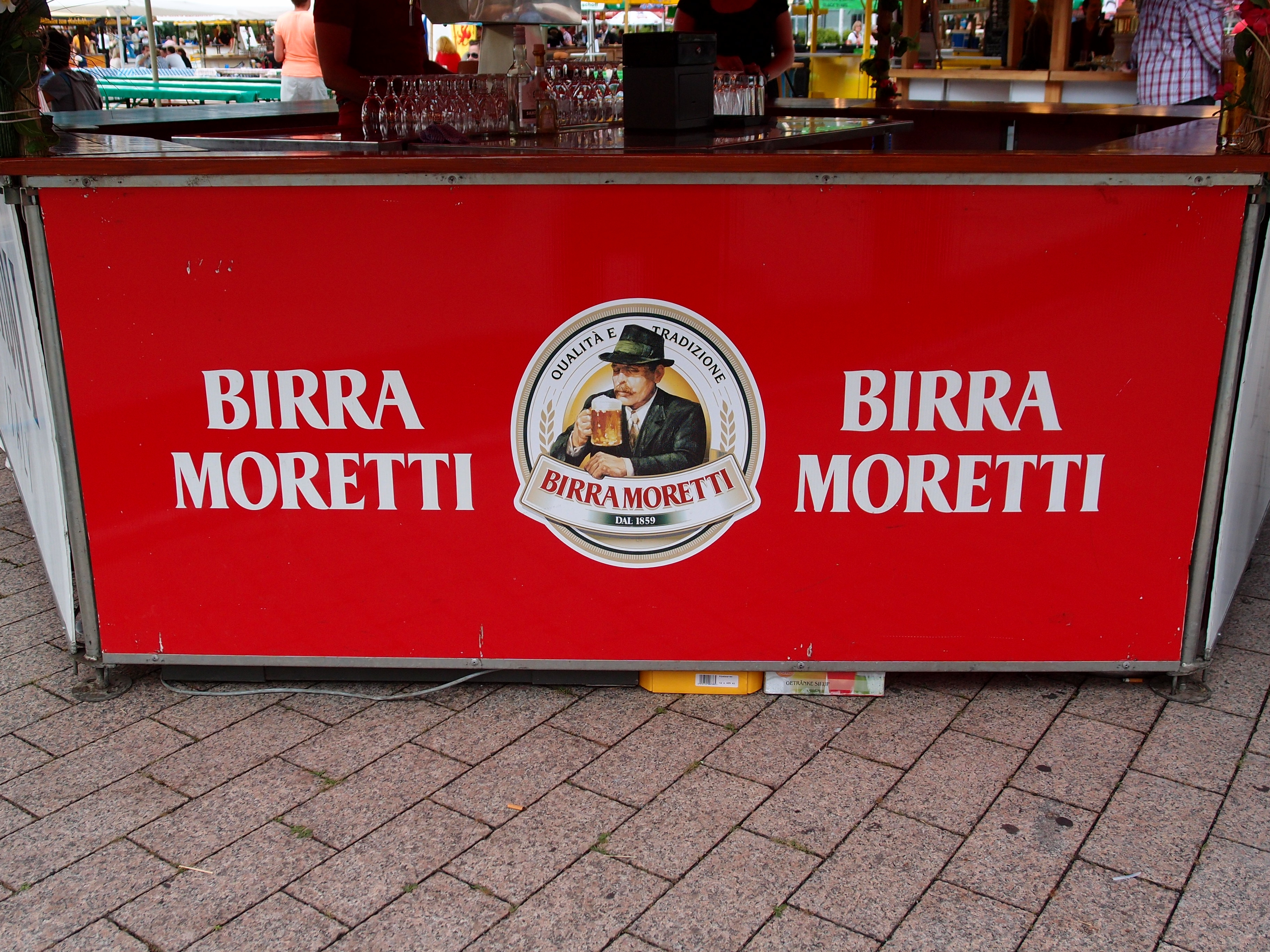 Stand "Birra Moretti" (italienisches Bier) - auf der 14. Kölner Bierbörse) Datum: 24.08.2012 Urheber: M. Pfeiffer alias Benutzer:Gordito1869 Quelle: privates Fotoarchiv des Urhebers